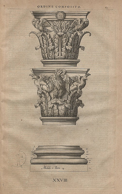 Original image description from the Deutsche Fotothek Architektur & Säule & Kompositordnung & Basis & Kapitell